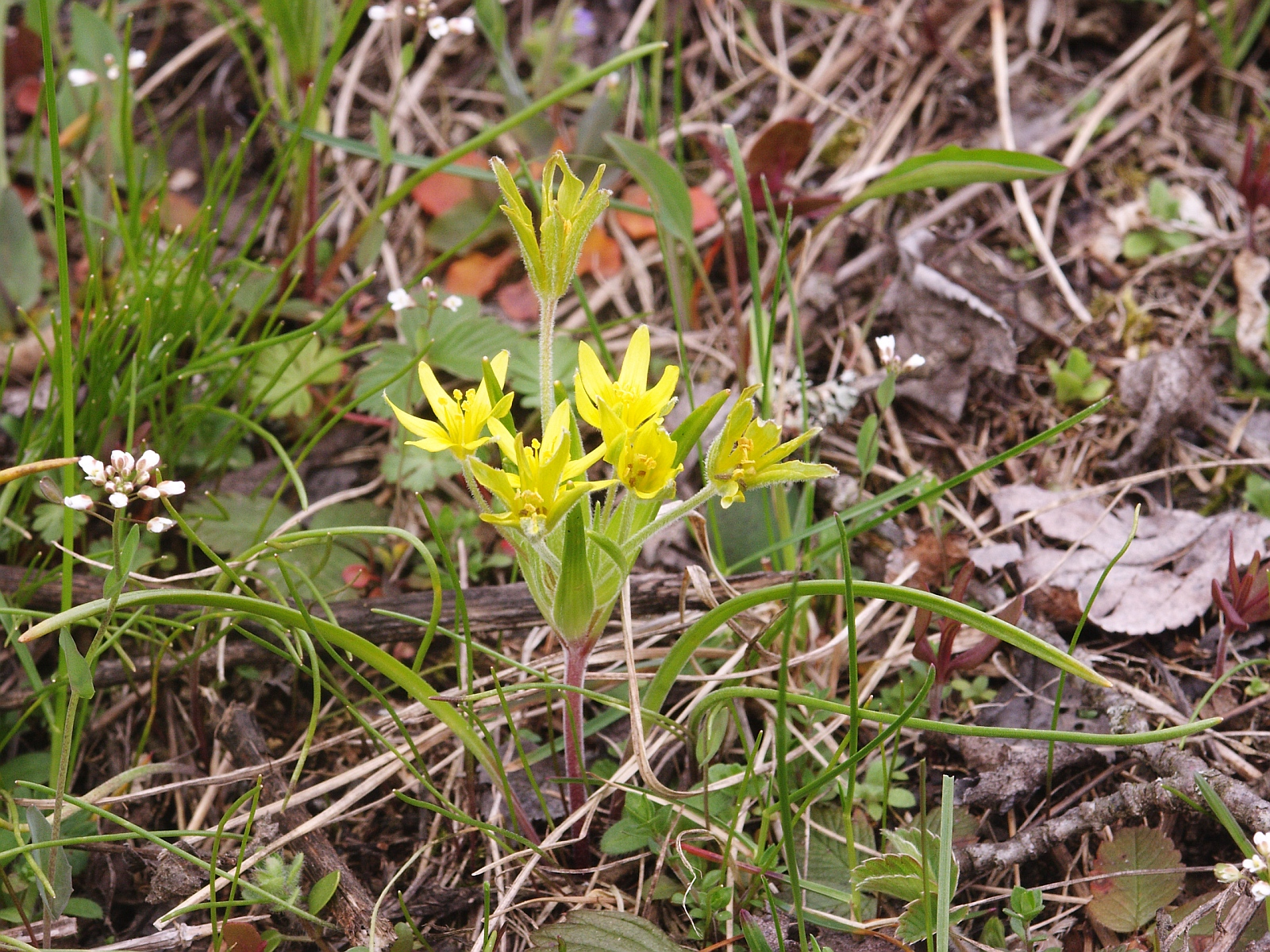 Gagea villosa, Taubergrund, Germany